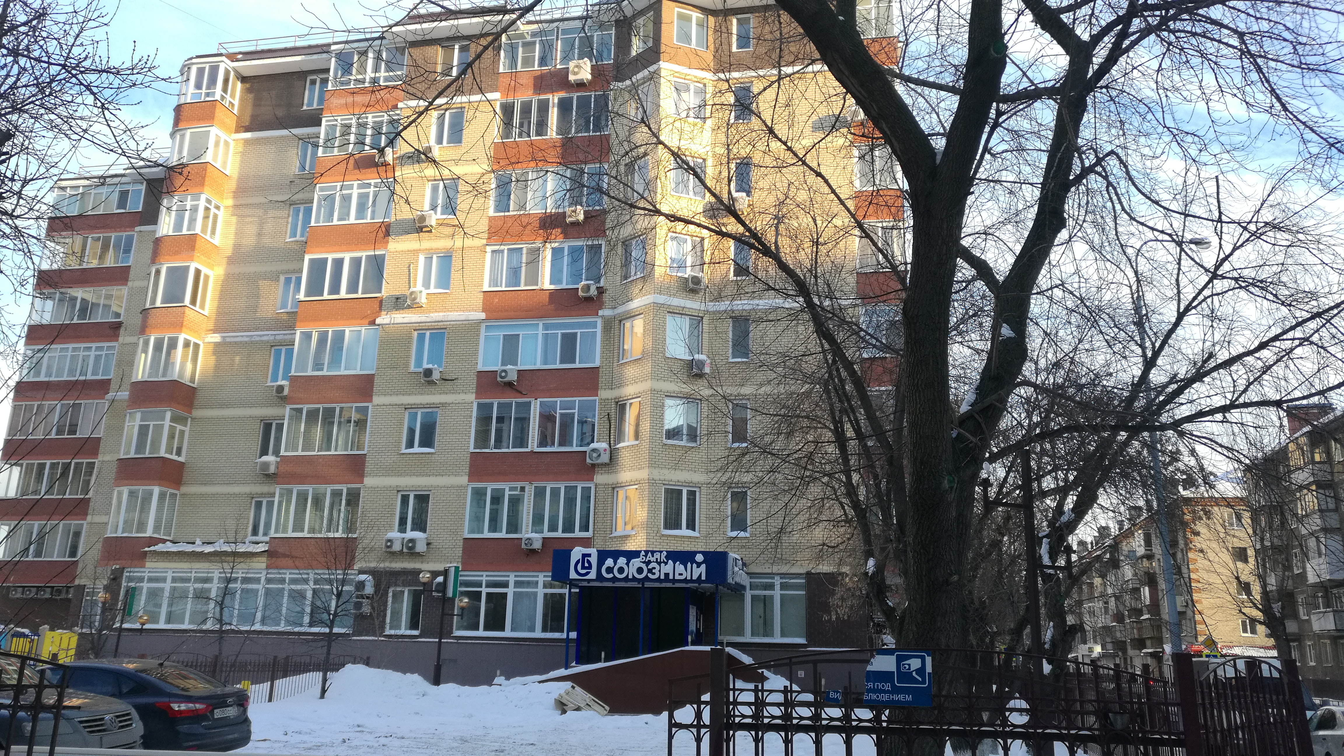 Loĝdomo en strato Fabriĉnaja, 5. Tjumeno, Rusio.